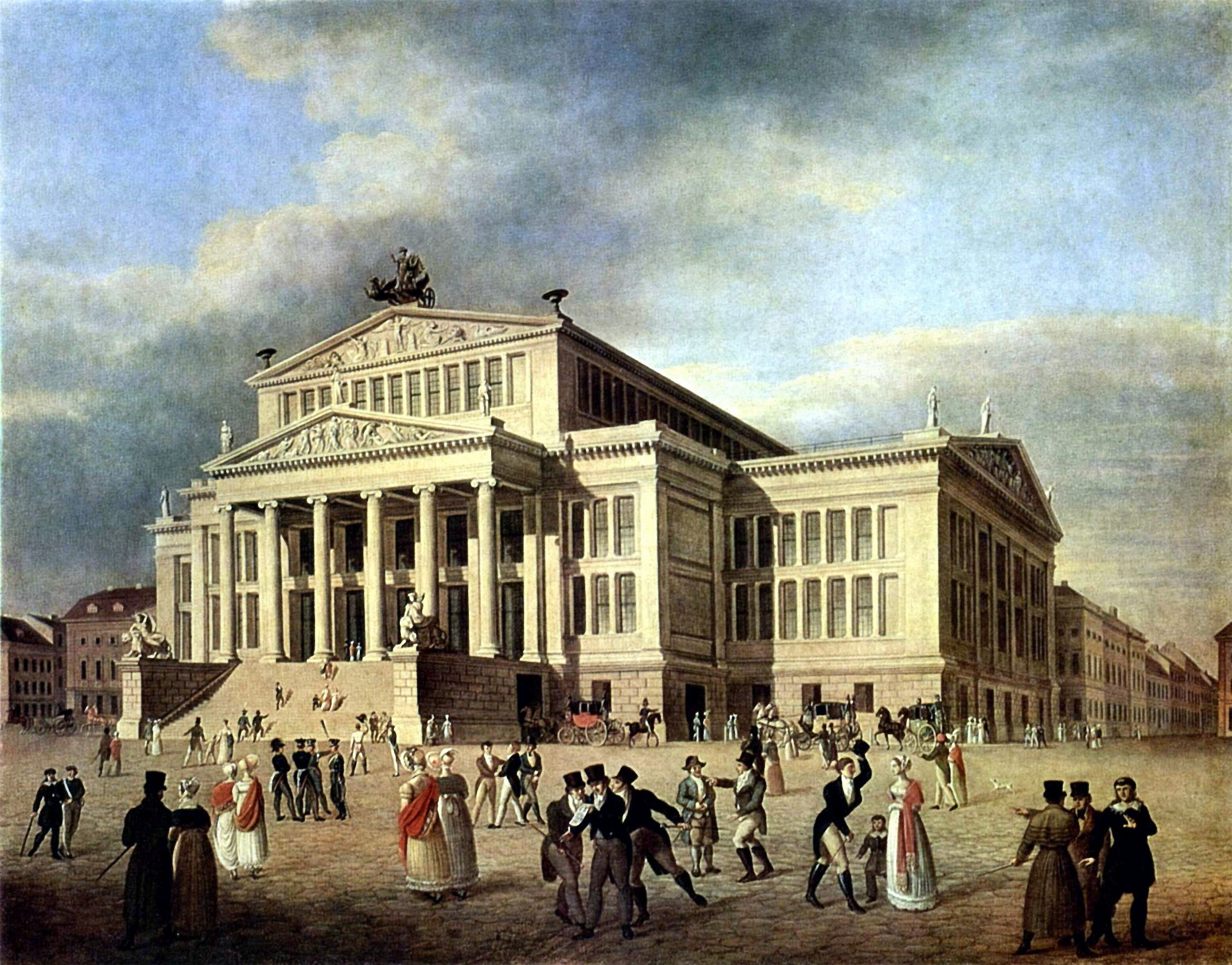 Farbige Darstellung des Schauspielhauses Berlin am Gendarmenmarkt (heute Konzerthaus Berlin).